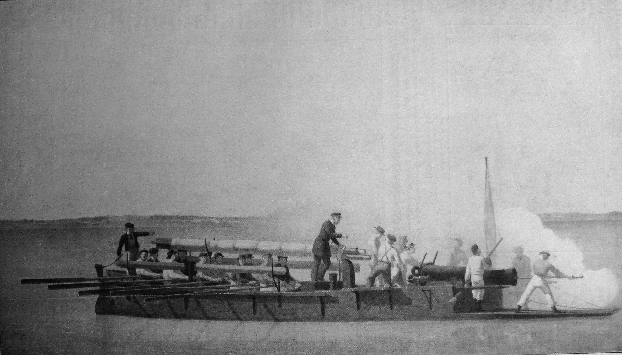 Kanonbåd åbner ild